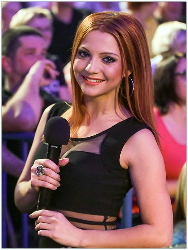 Tanja Žagar na Noči Modrijanov 2013.